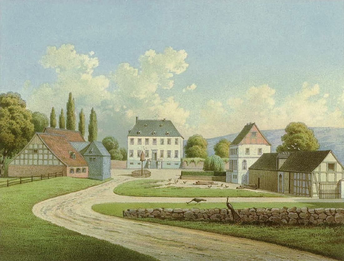 Rittergut Bockum, Kreis Meschede, Provinz Westphalen